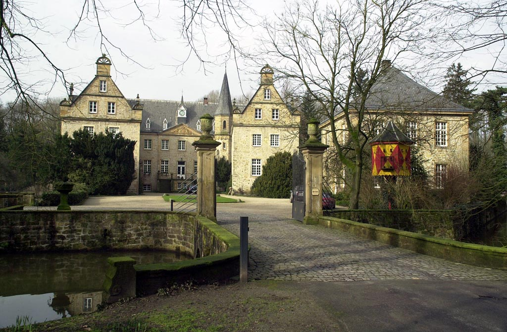 Das Wasserschloss Surenburg im Hörsteler Ortsteil Riesenbeck